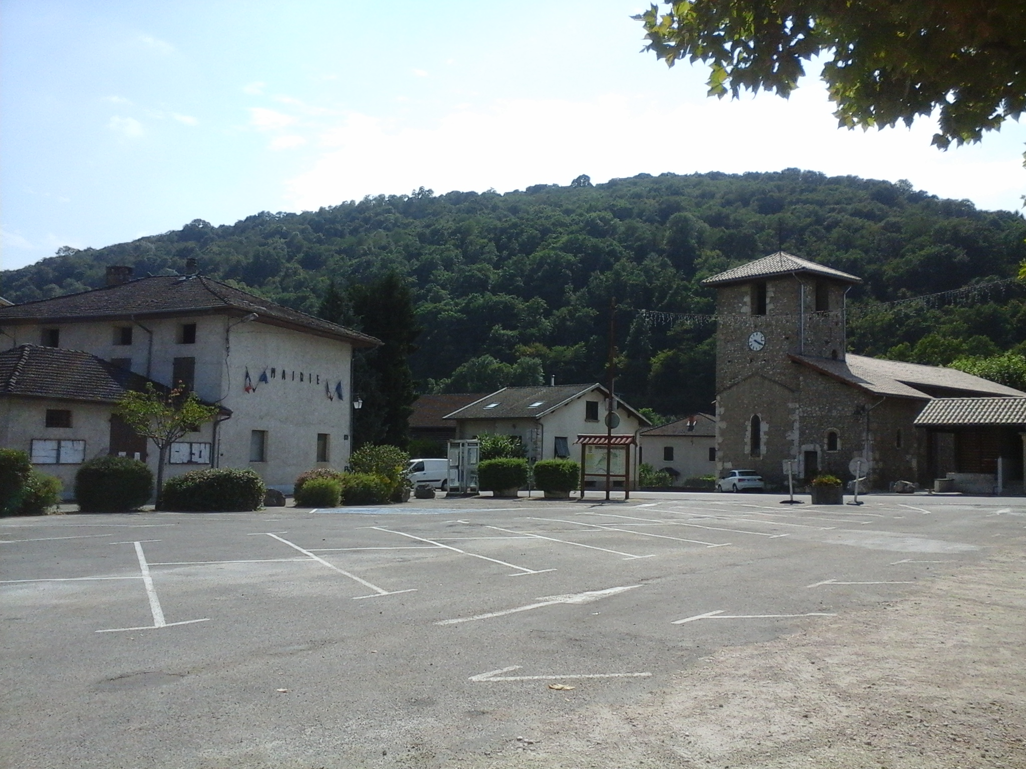 Poliénas, Isère, juillet 2015.